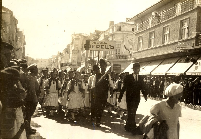 4-ти селскостопански културен и национален събор, 28 - 29 август 1938 г., гр. Варна. Парад на участниците в събора по ул. Княз Борис І. На преден план са представителите на община Езерец, Добричко.